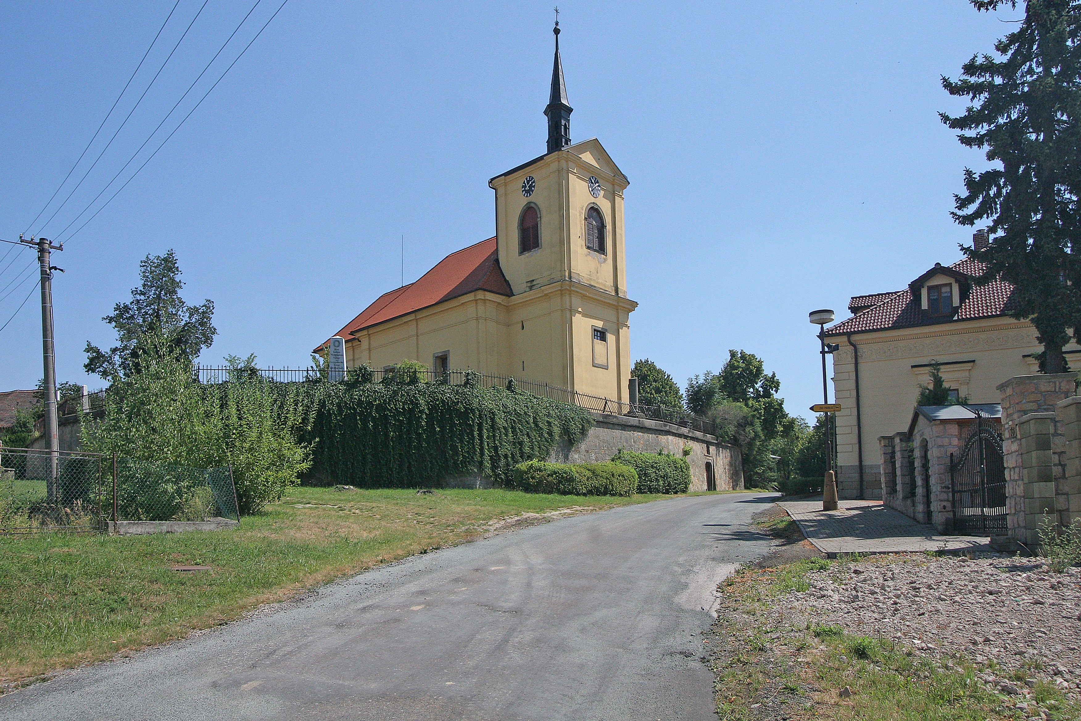 Probluz kostel Všech Svatých